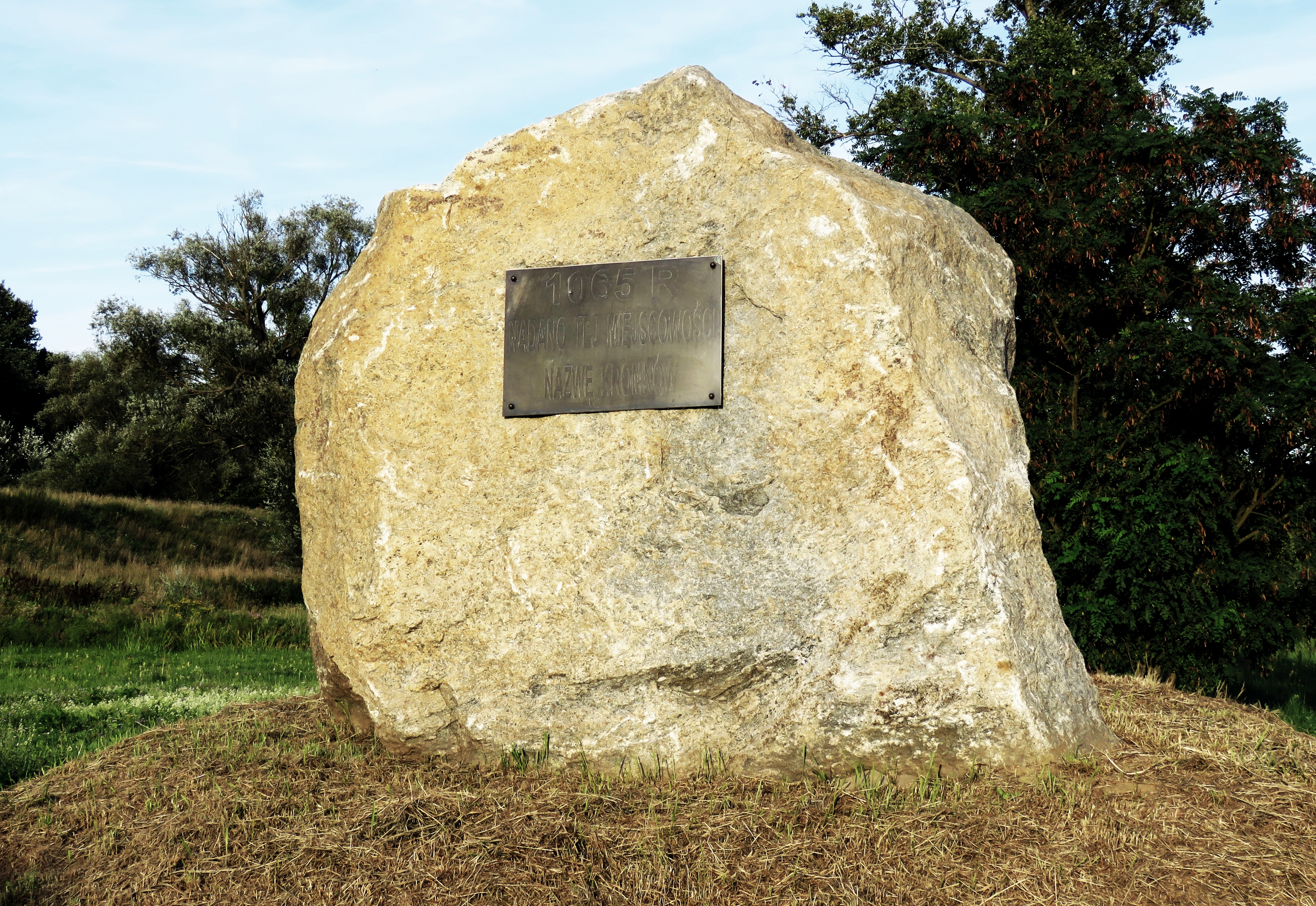 Kromnów 04, miejsce upamiętniające nadanie nazwy miejscowości w 1045 roku.